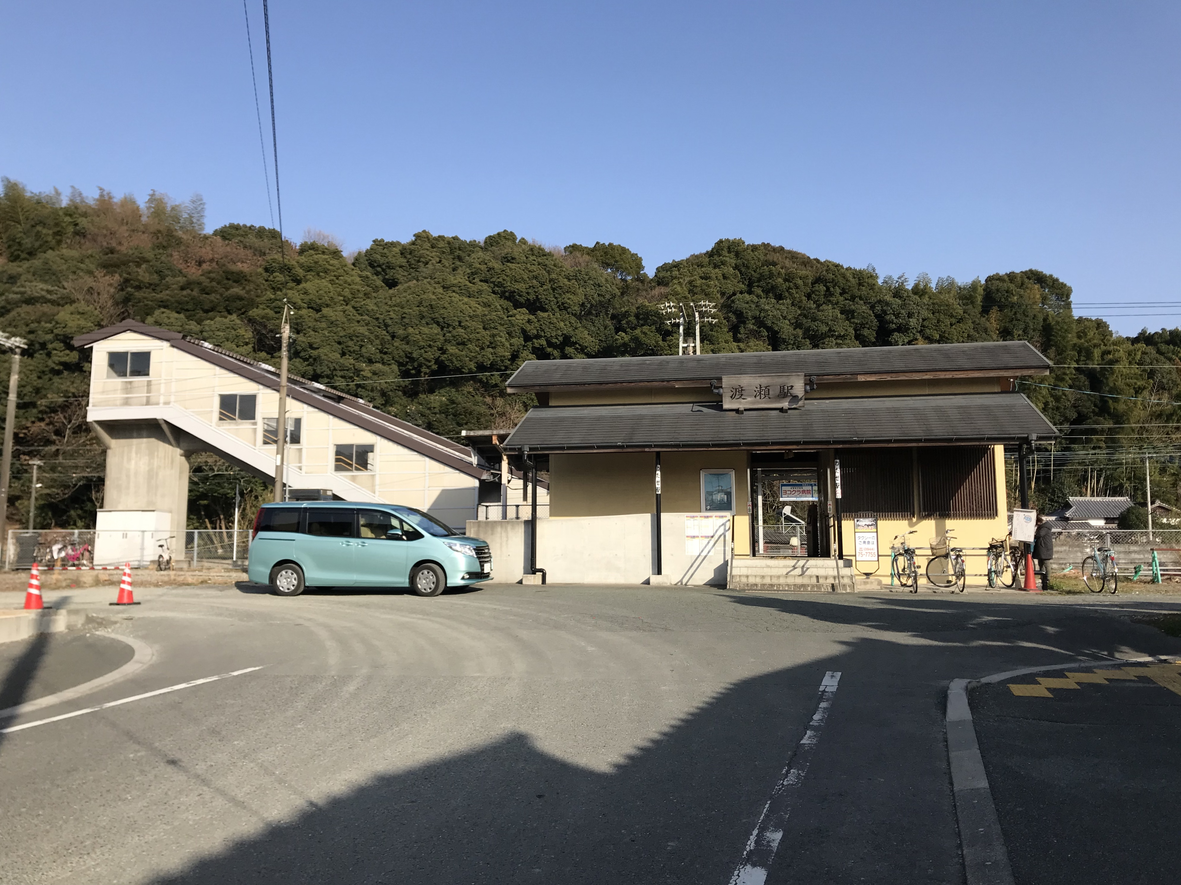 渡瀬駅の駅舎